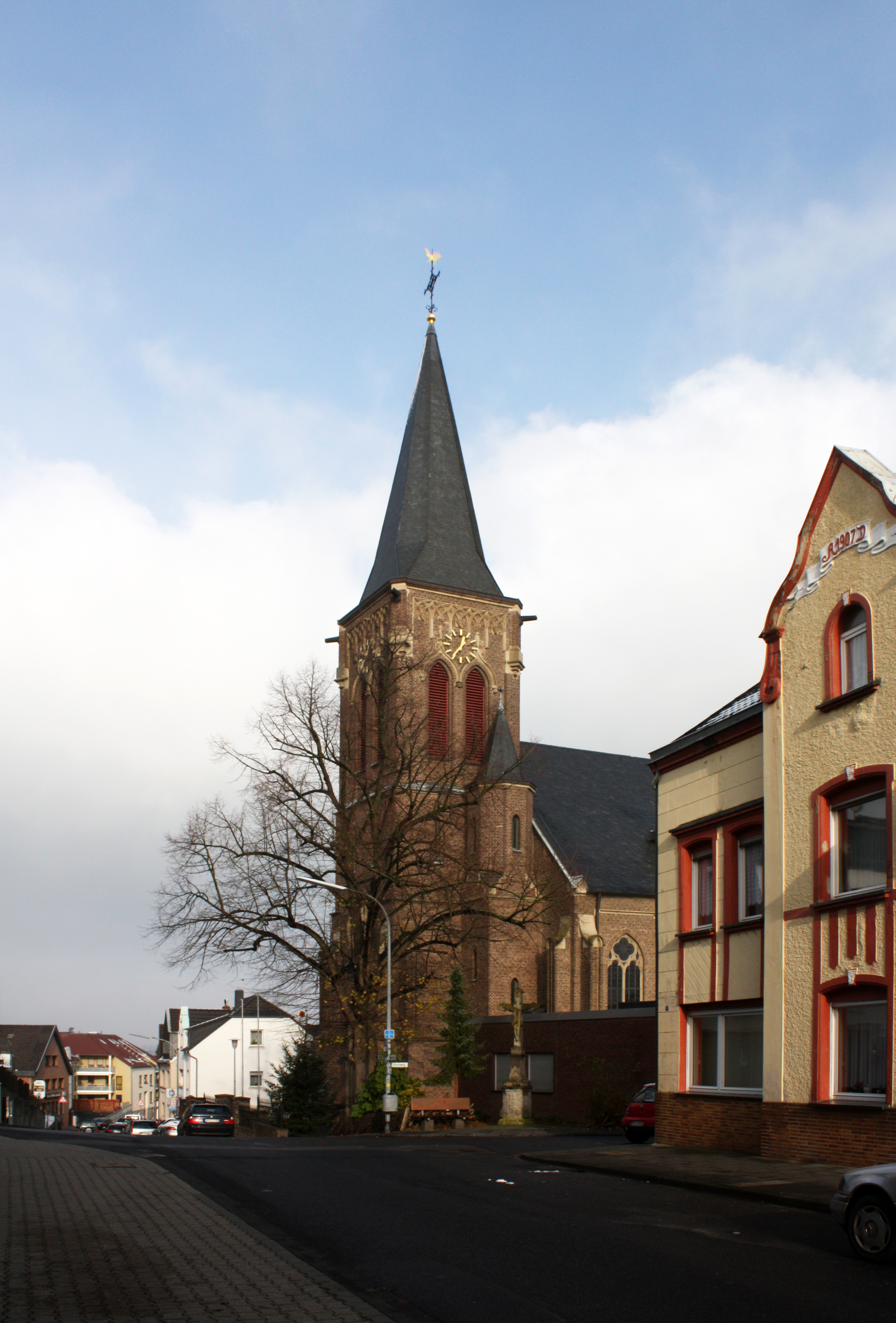 Sankt Pantaleon Brühl-Badorf